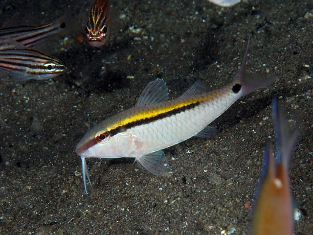 オオスジヒメジ Parupeneus barberinus